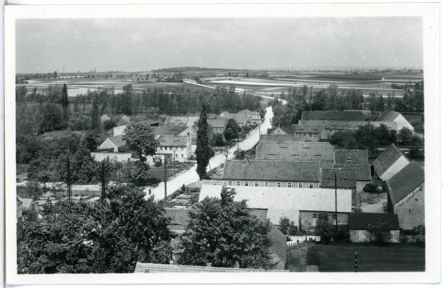 Lenz; Blick auf Lenz This postcard is from publisher Brück & Sohn in Meißen ( postcard has a unique number 28875 and is available in a higher resolution at the publisher. This images was uploaded in a cooperation project between Wikipedians and the publisher.